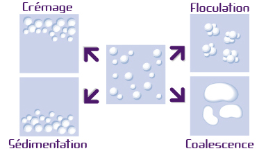 Phénomènes majeurs de déstabilisation d'une dispersion liquide